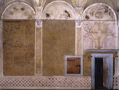 Camera picta, parete sud